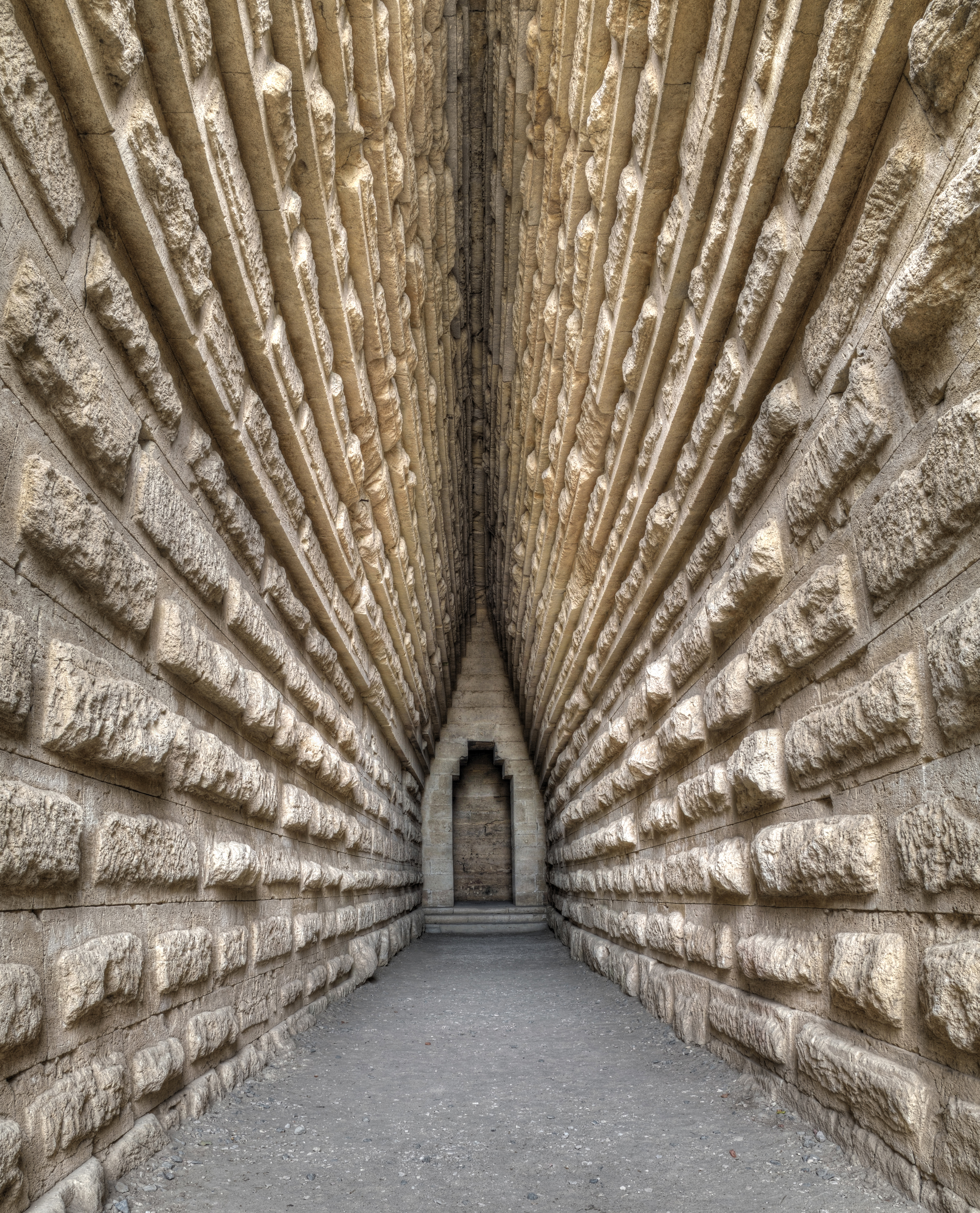 Царський курган, Керч, біля Аджимушкайських каменярень (400–500 м на схід)